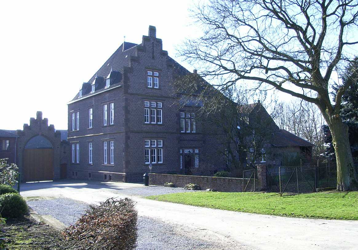 Der Machabäerhof, Gutshof in Titz-Spiel, NRW